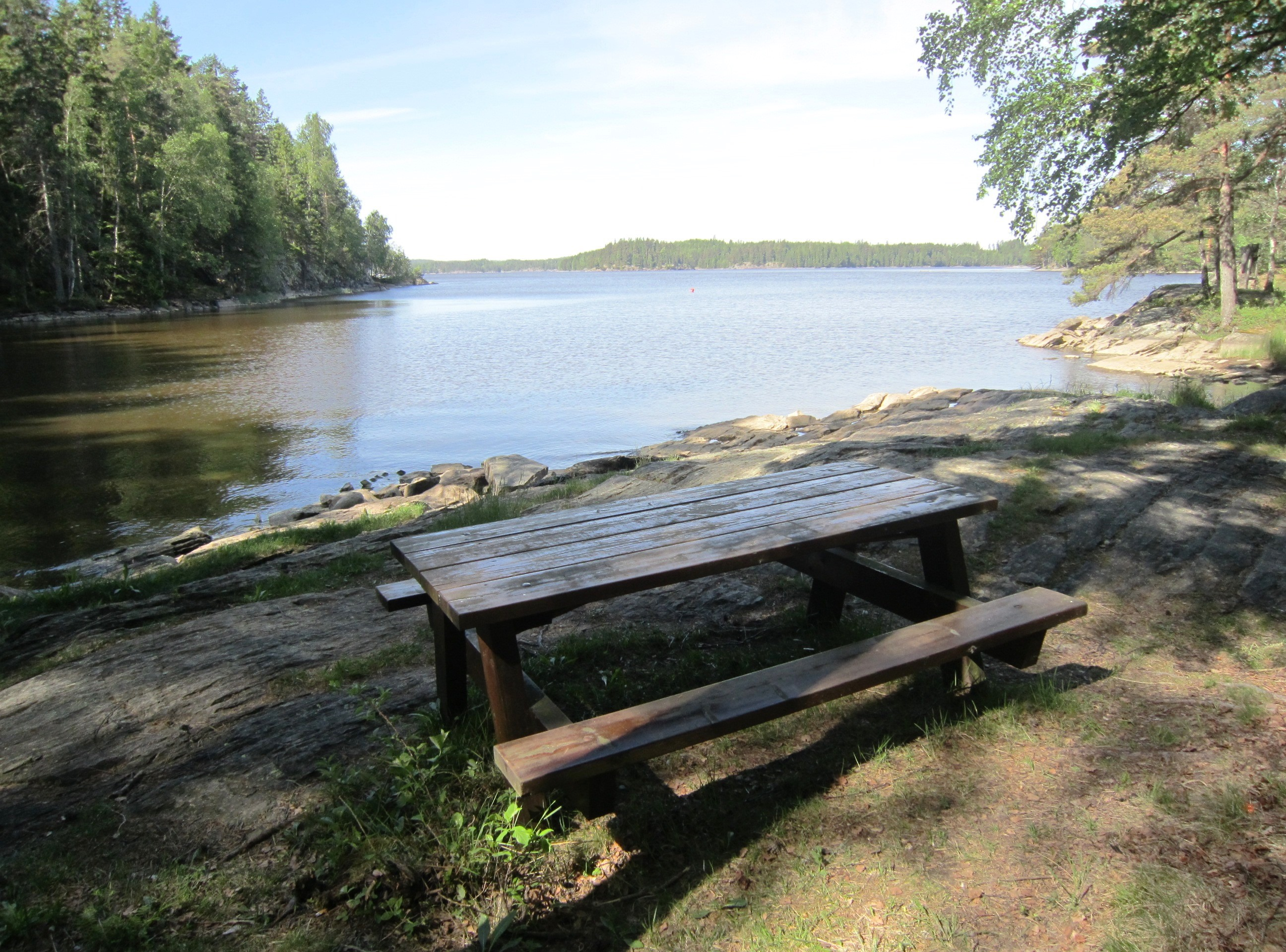 Tripperødbukta ved Aspern